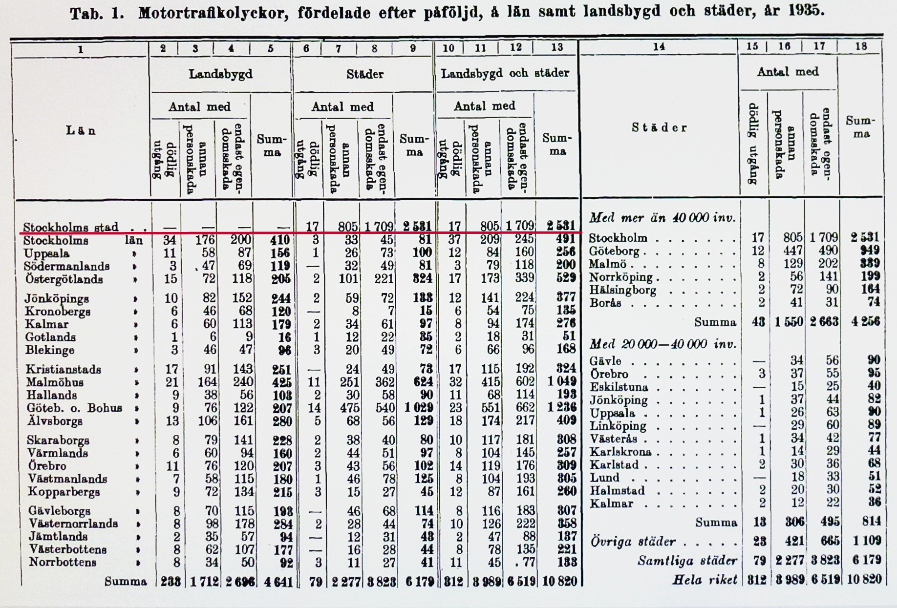 Trafikolyckor Sverige 1935